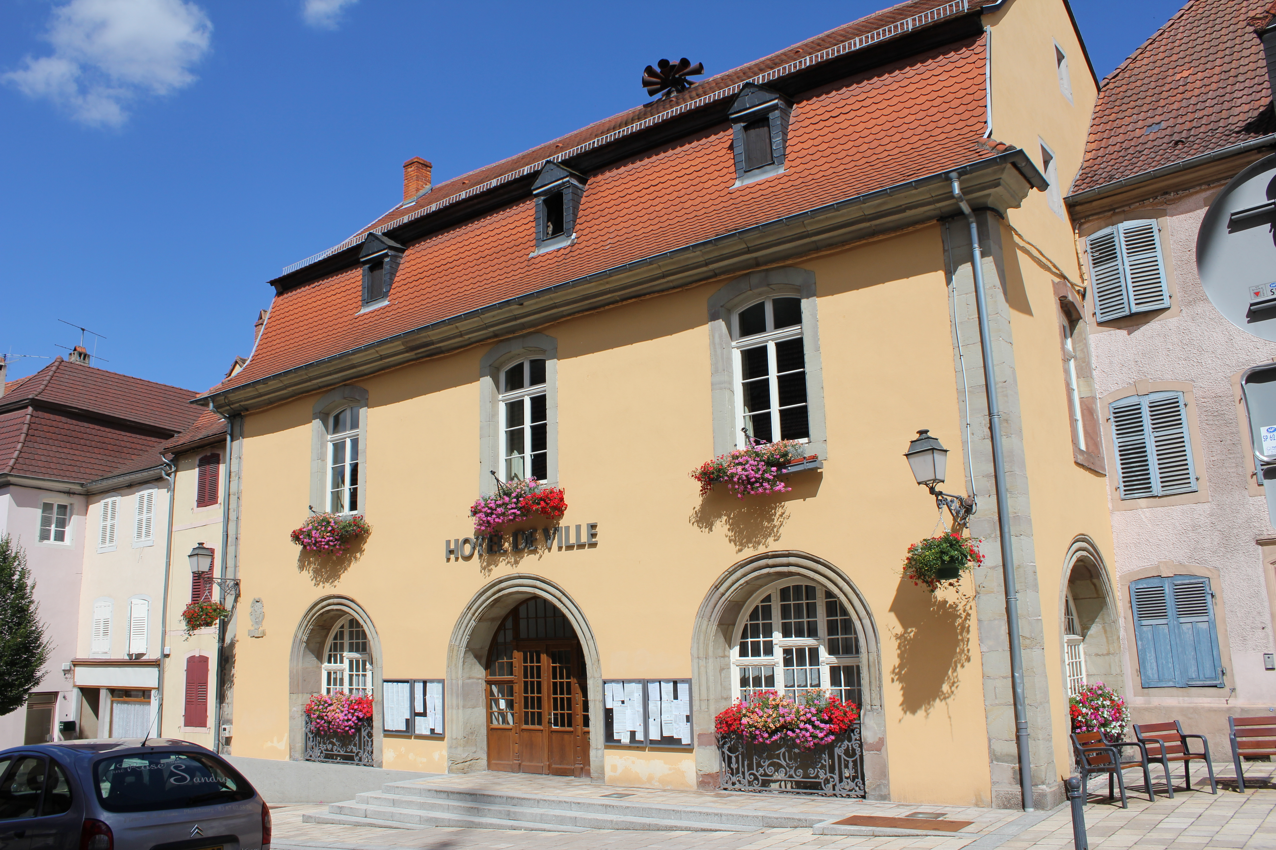 Hotel de Ville, Sarre-Union, Alsace-Champagne-Ardenne-Lorraine, France